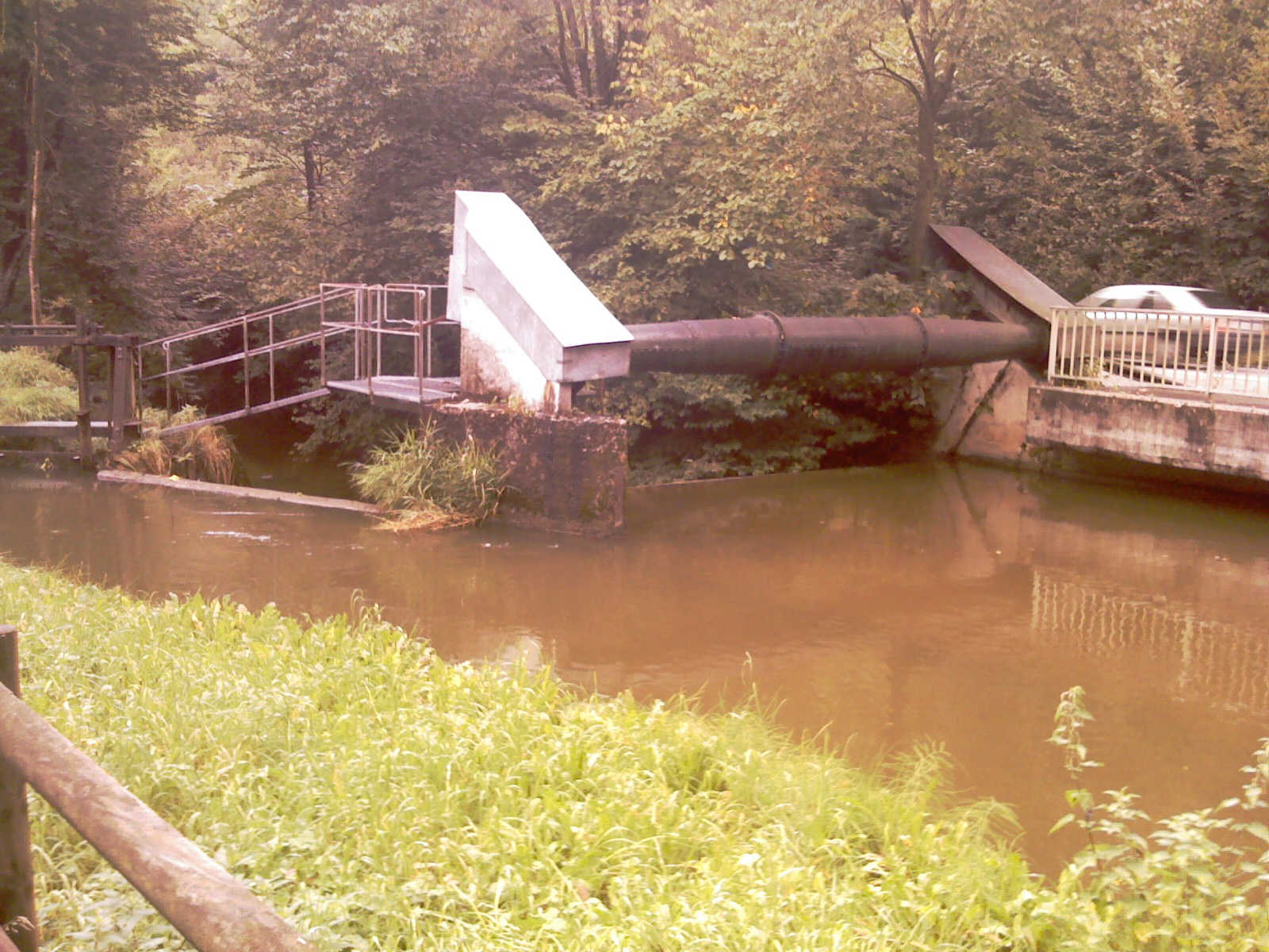 Ustermer Aa weir at/baraĵo en/Stauwehr in Aatal